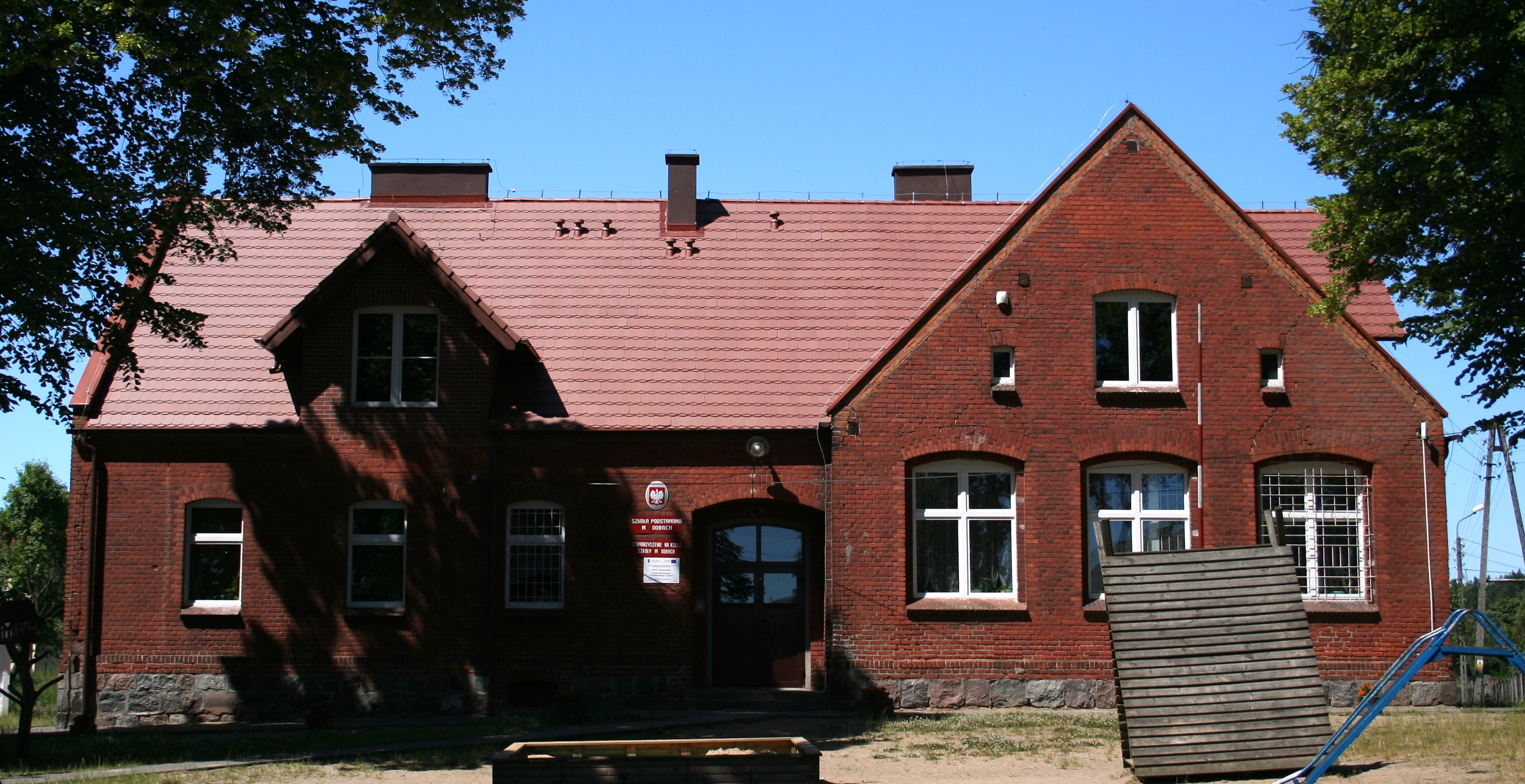 Szkoła podstawowa w Odrach, , powiat chojnicki